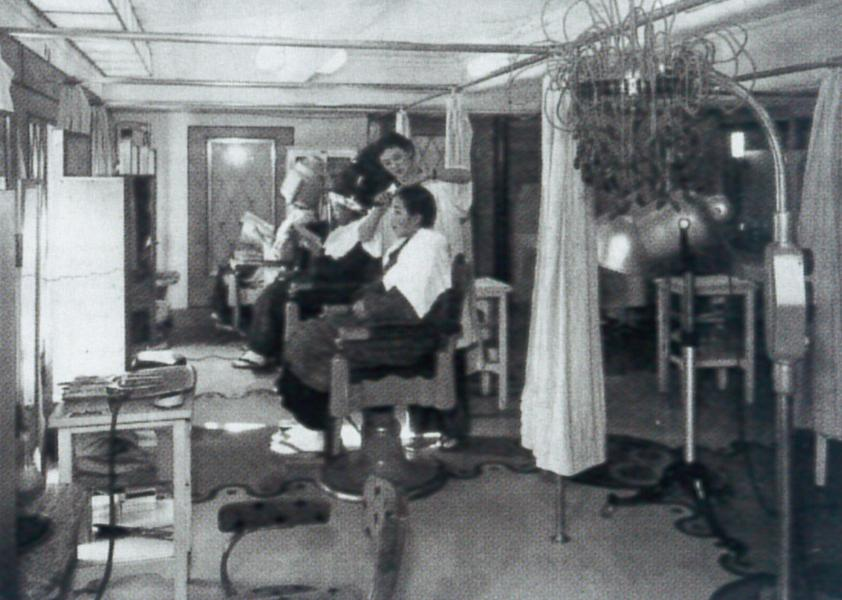 Miyoka Shibayama's Beauty salon in Matsuzakaya, Ueno